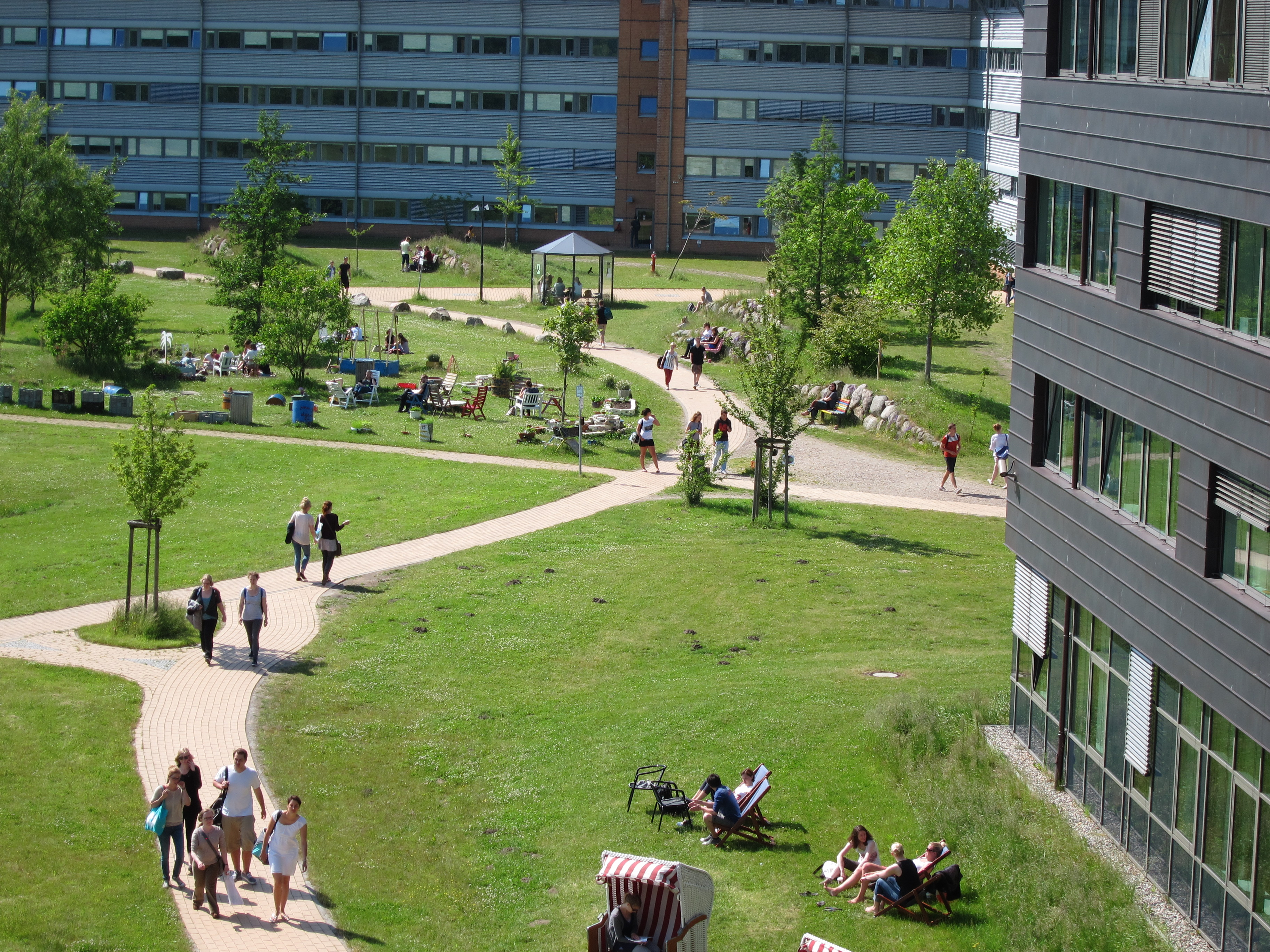 Blick auf die Gebäude Helsinki und Oslo